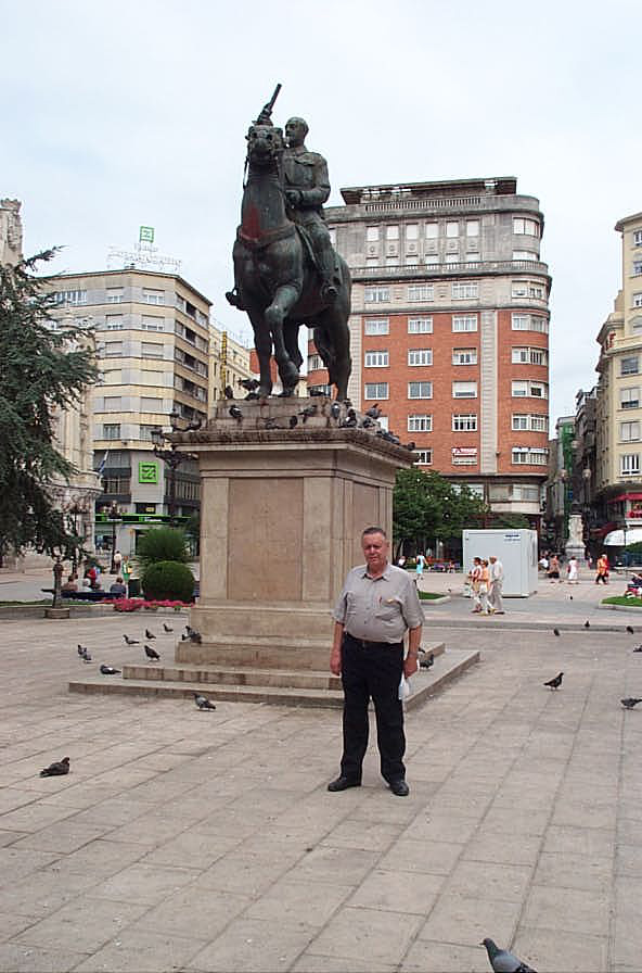 Estatua ecuestre del General Franco en Santander. Fue retirada a finales del 2008.